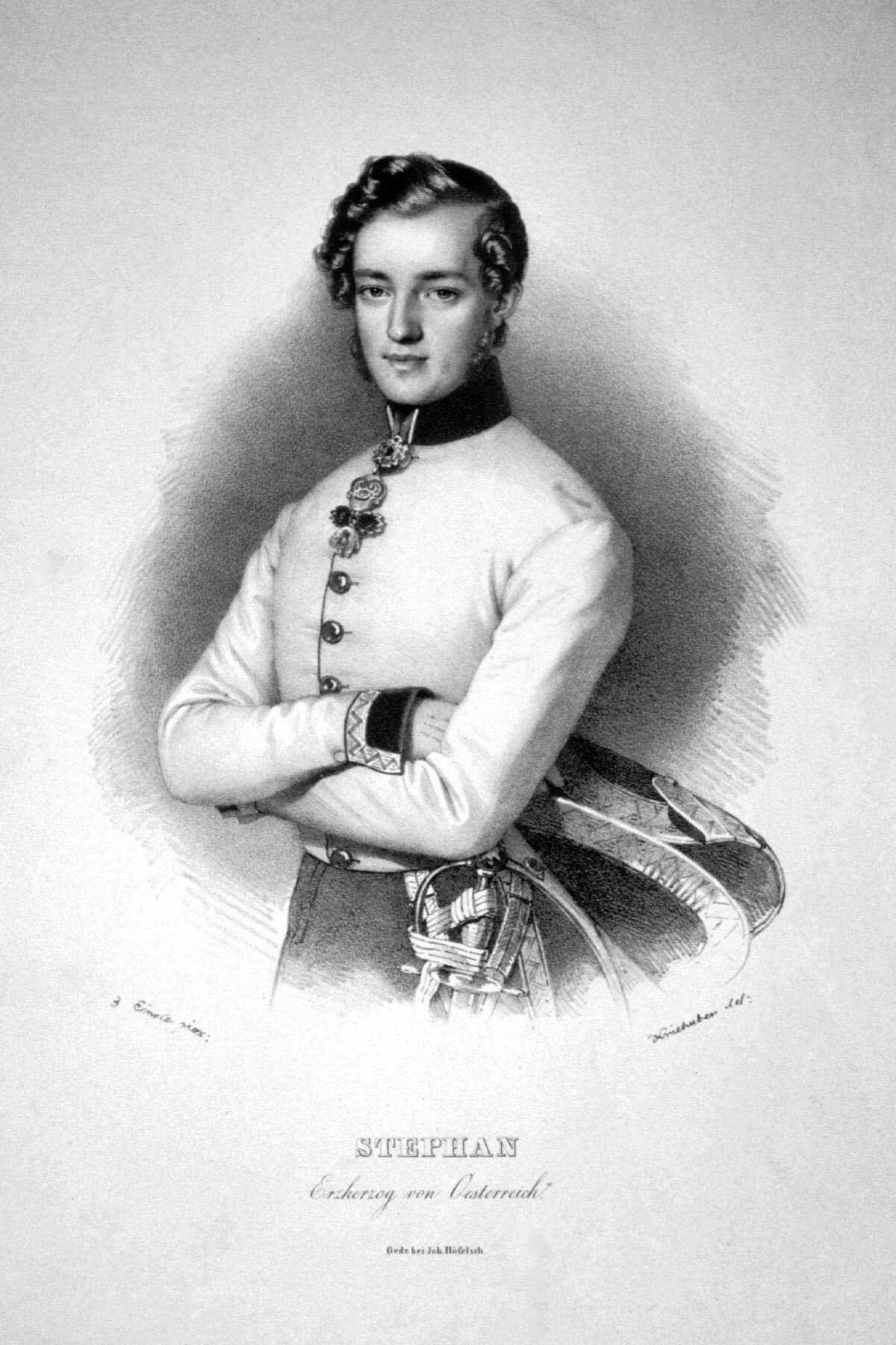 Erzherzog Stephan von Österreich (1817-1867), Palatin von Ungarn